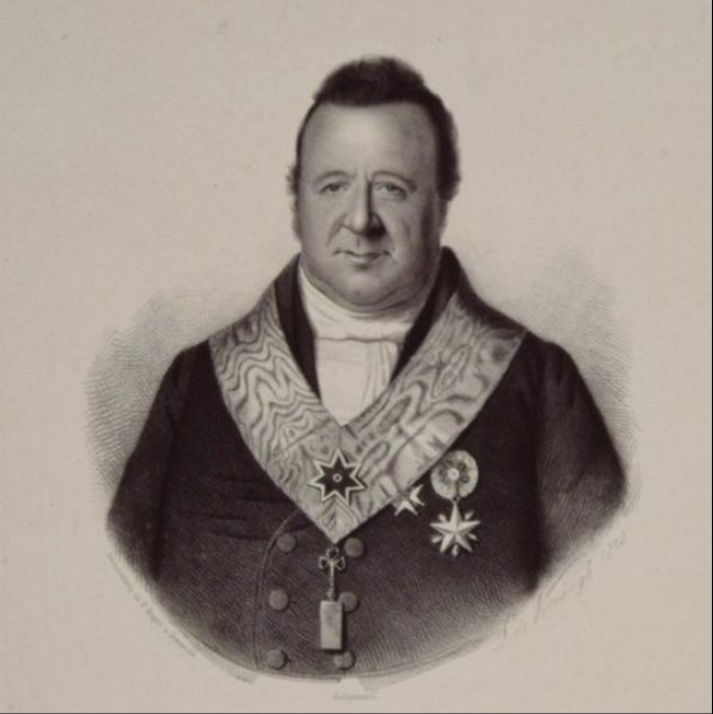 portret (litho) van de scheepsbouwmeester Jan Schouten (1786-1852) uit Dordrecht